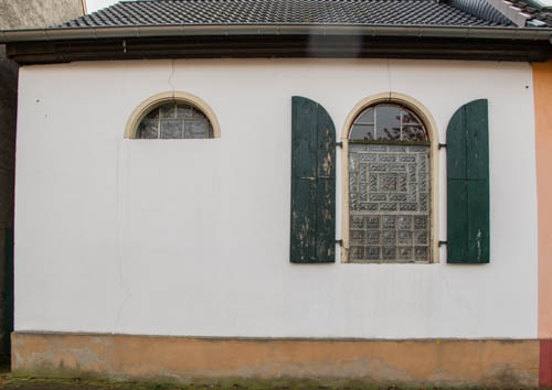 Ehemalige Synagoge in Dolgesheim